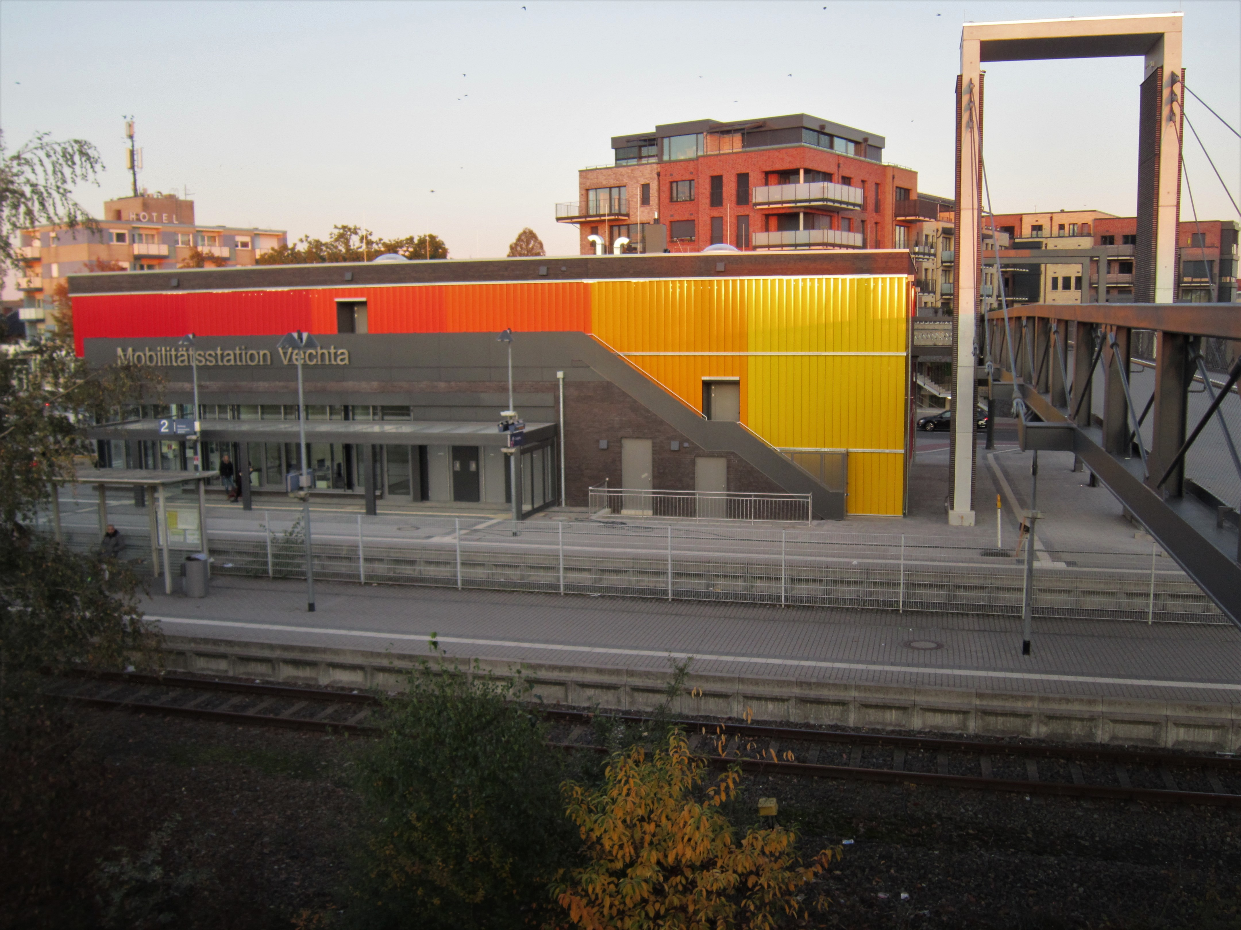 Neues Bahnhofsviertel Vechta: Im Vordergrund der Bahnhof an der Bahnlinie Delmenhorst-Hesepe; in der Mitte links die Mobilitätsstation mit der Radstation (Fahrradabstellhaus); in der Mitte rechts die Bahnhofsbrücke; im Hintergrund neue Wohnhäuser.